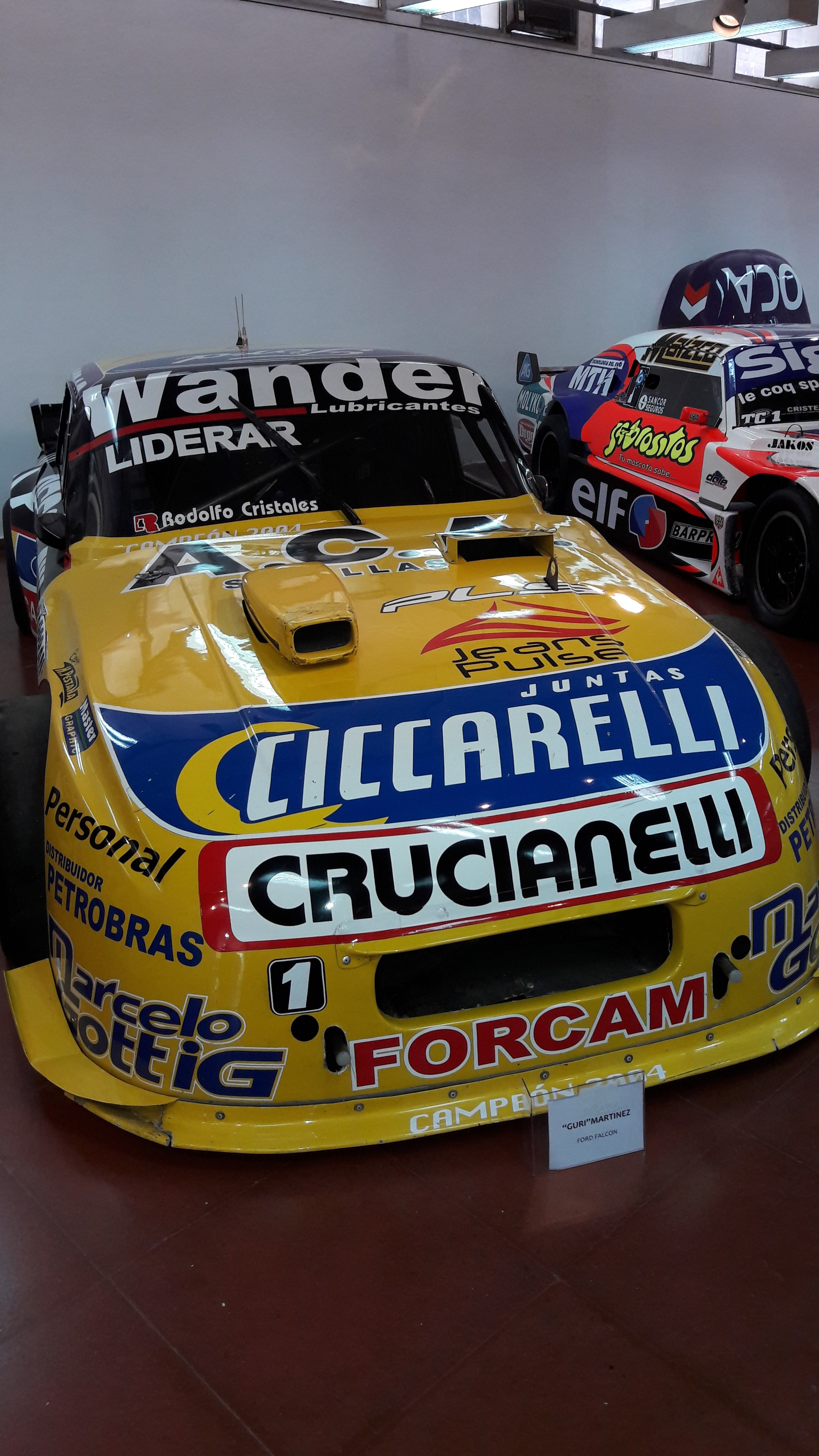 Ford Falcon - Omar Martínez. Expo Autos, Museo de Bellas Artes de Luján.